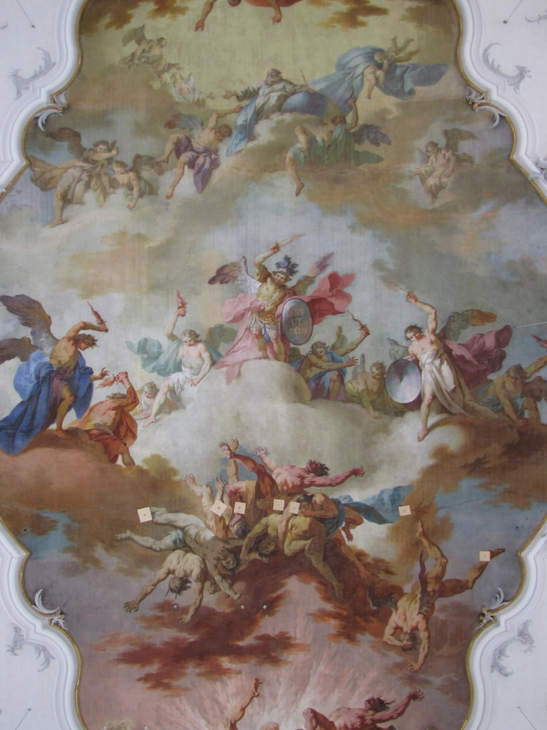 Luzifers Sturz, Fresko im Hauptfeld über dem Langhaus der Pfarrkirche Denklingen